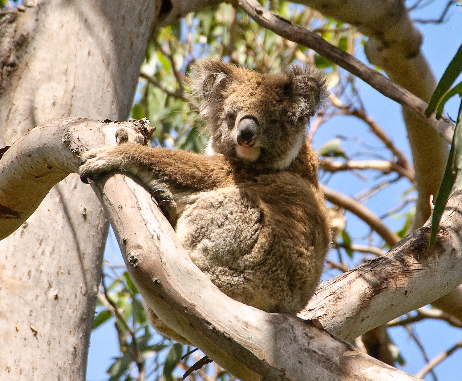 koala :)